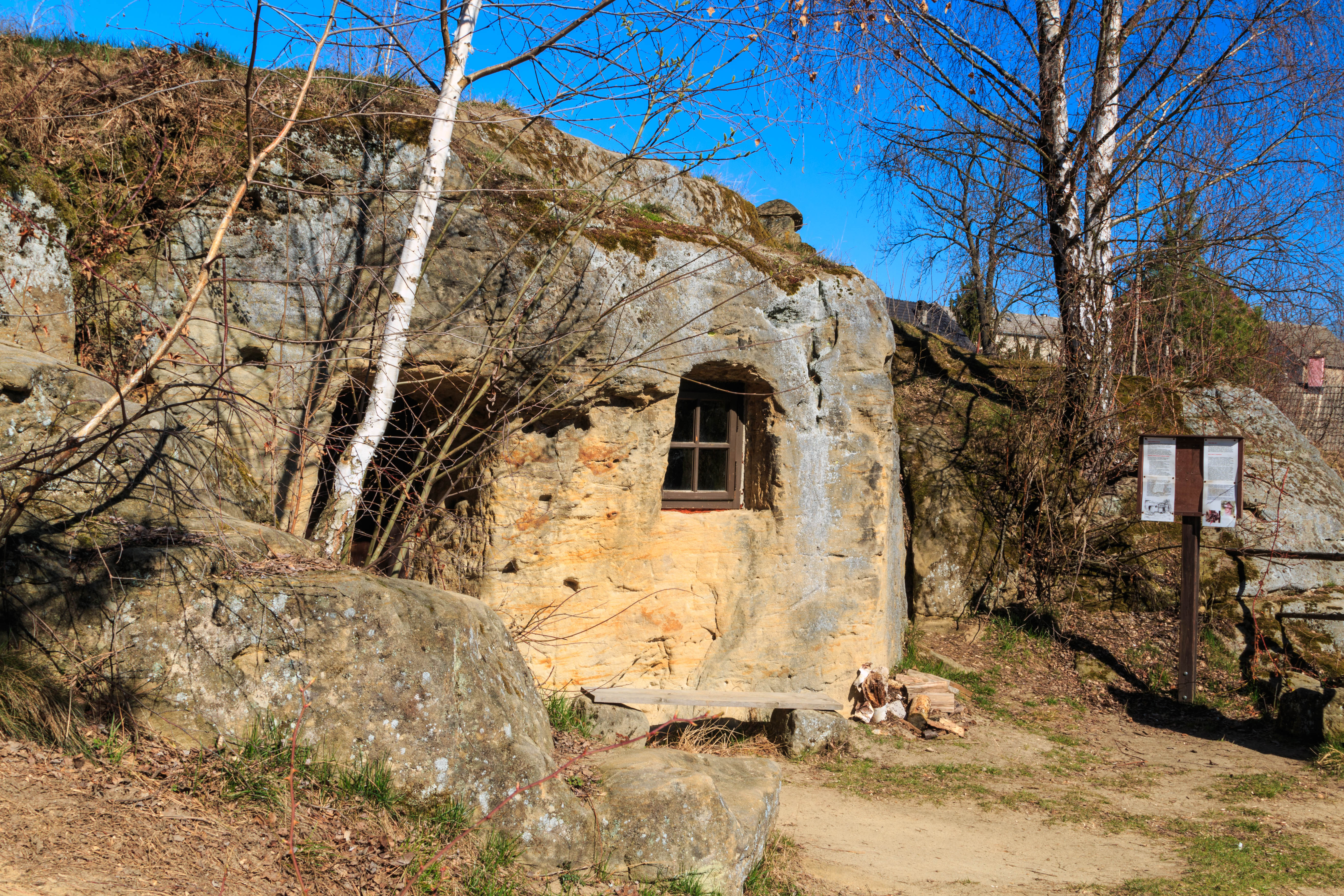 Zderaz - skalní obydlí